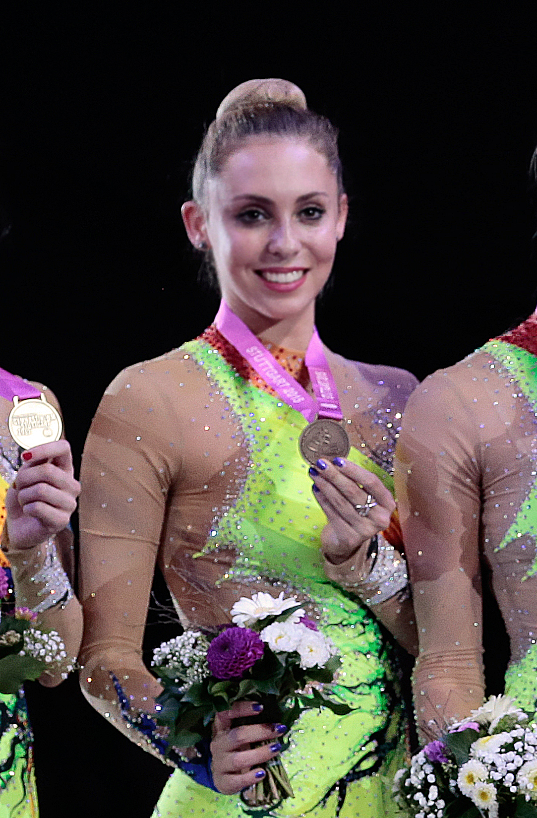 Lidia Redondo con la medalla de bronce en el podio de la general en el Campeonato Mundial de Stuttgart en 2015.